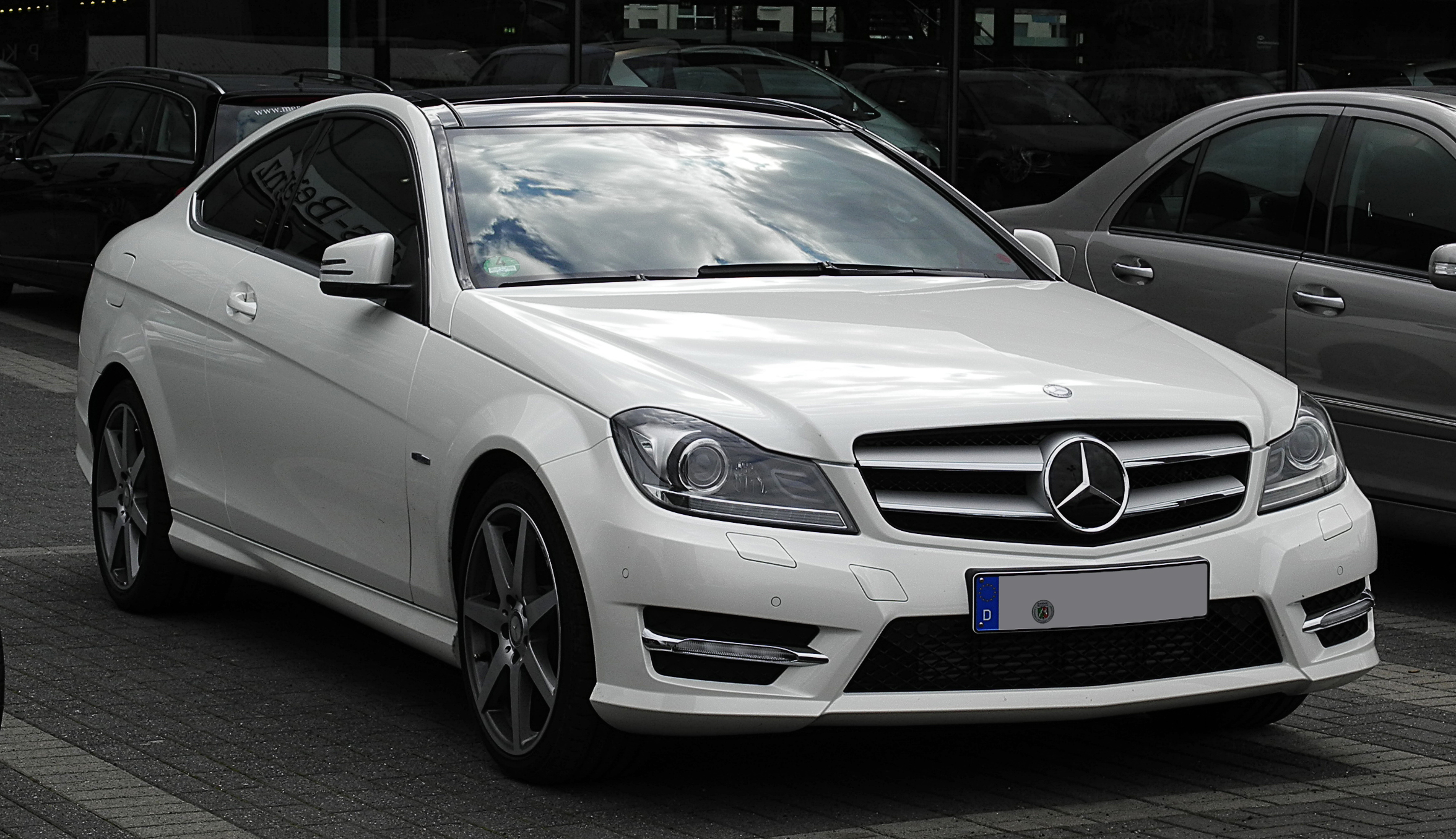 Mercedes-Benz C 250 CDI BlueEFFICIENCY Coupé Edition 1 (C 204)